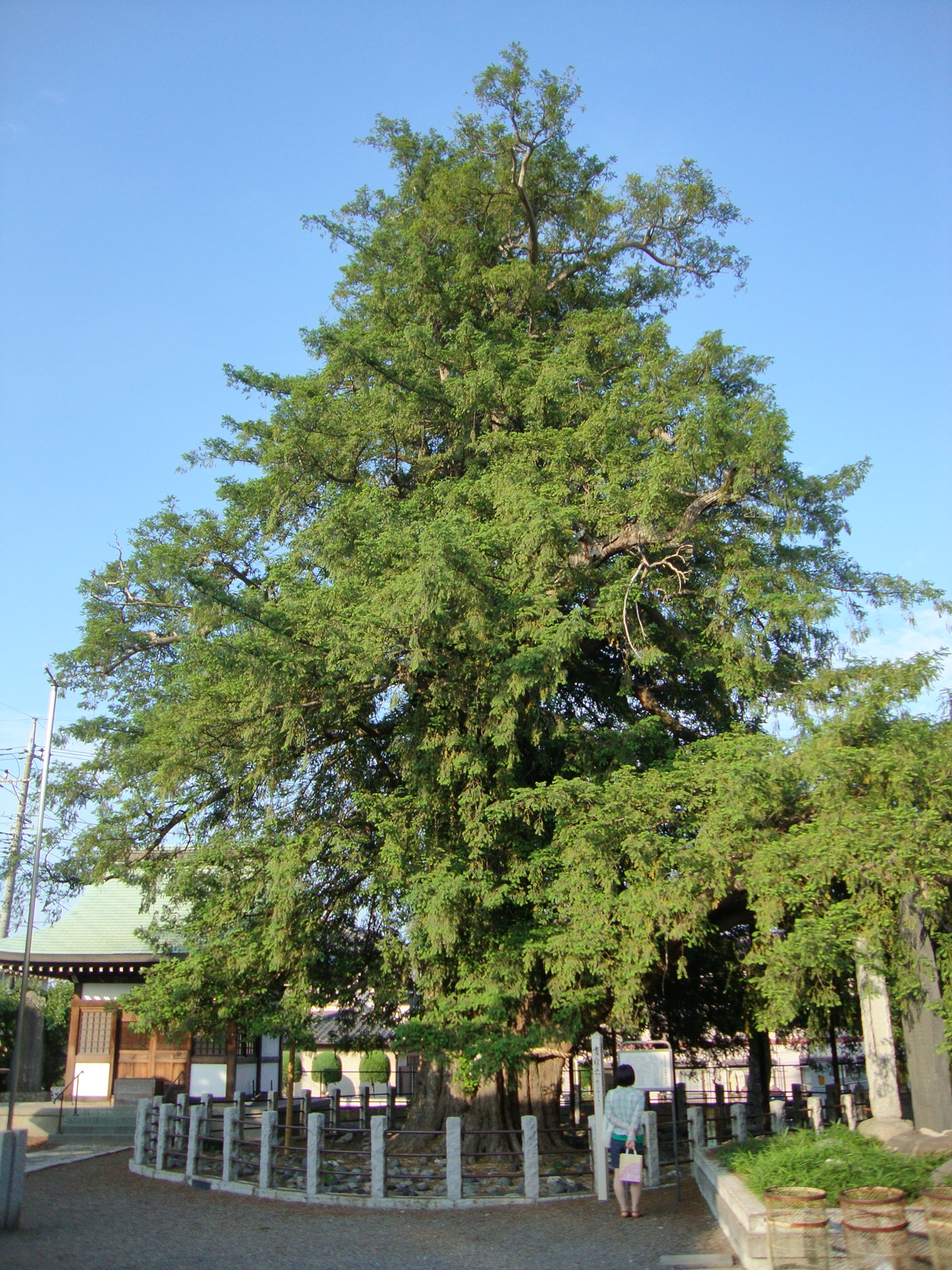 さいたま市中央区の妙行寺境内にあるカヤの巨木。「与野の大かや」として知られる。